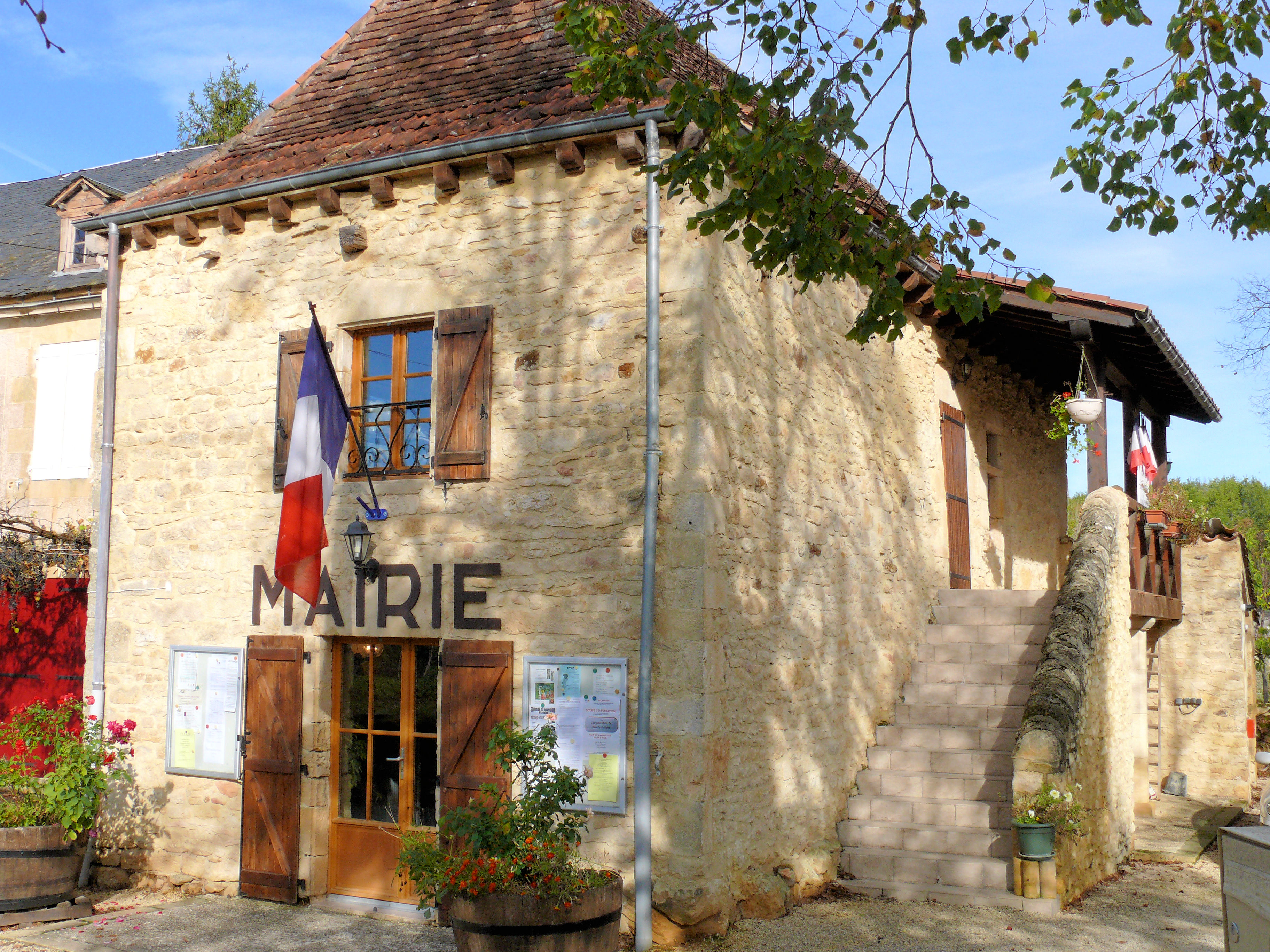 Fajoles - Mairie